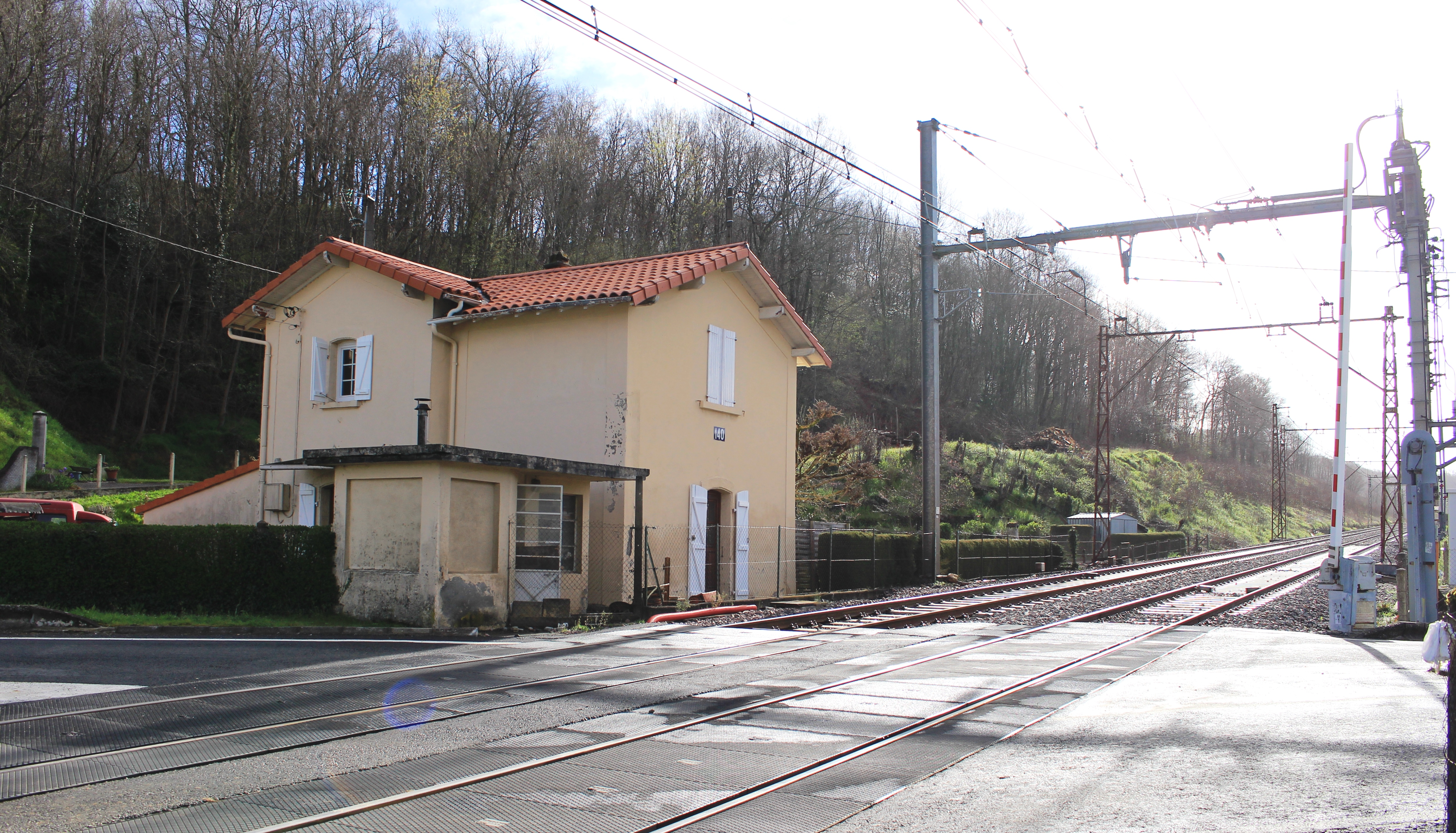 Passage à niveau de Lanespède (Hautes-Pyrénées)